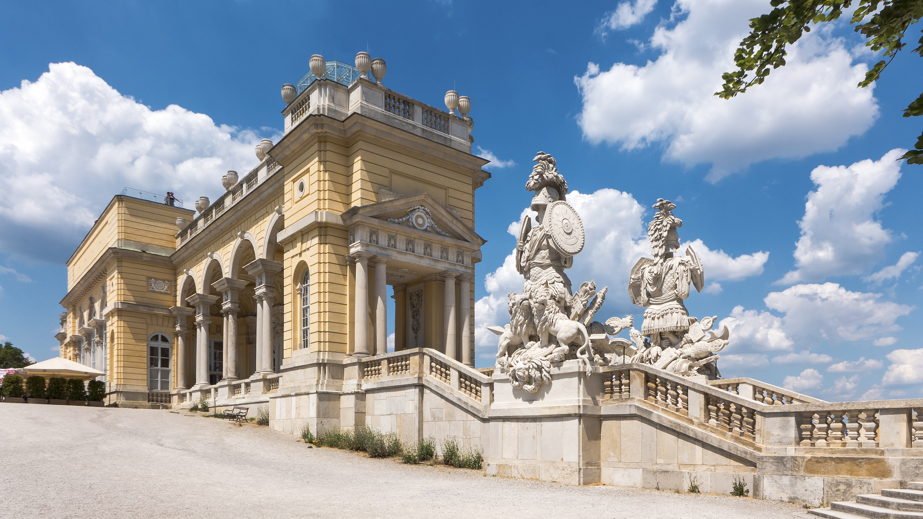 Gloriette in Wien 13, Rückansicht